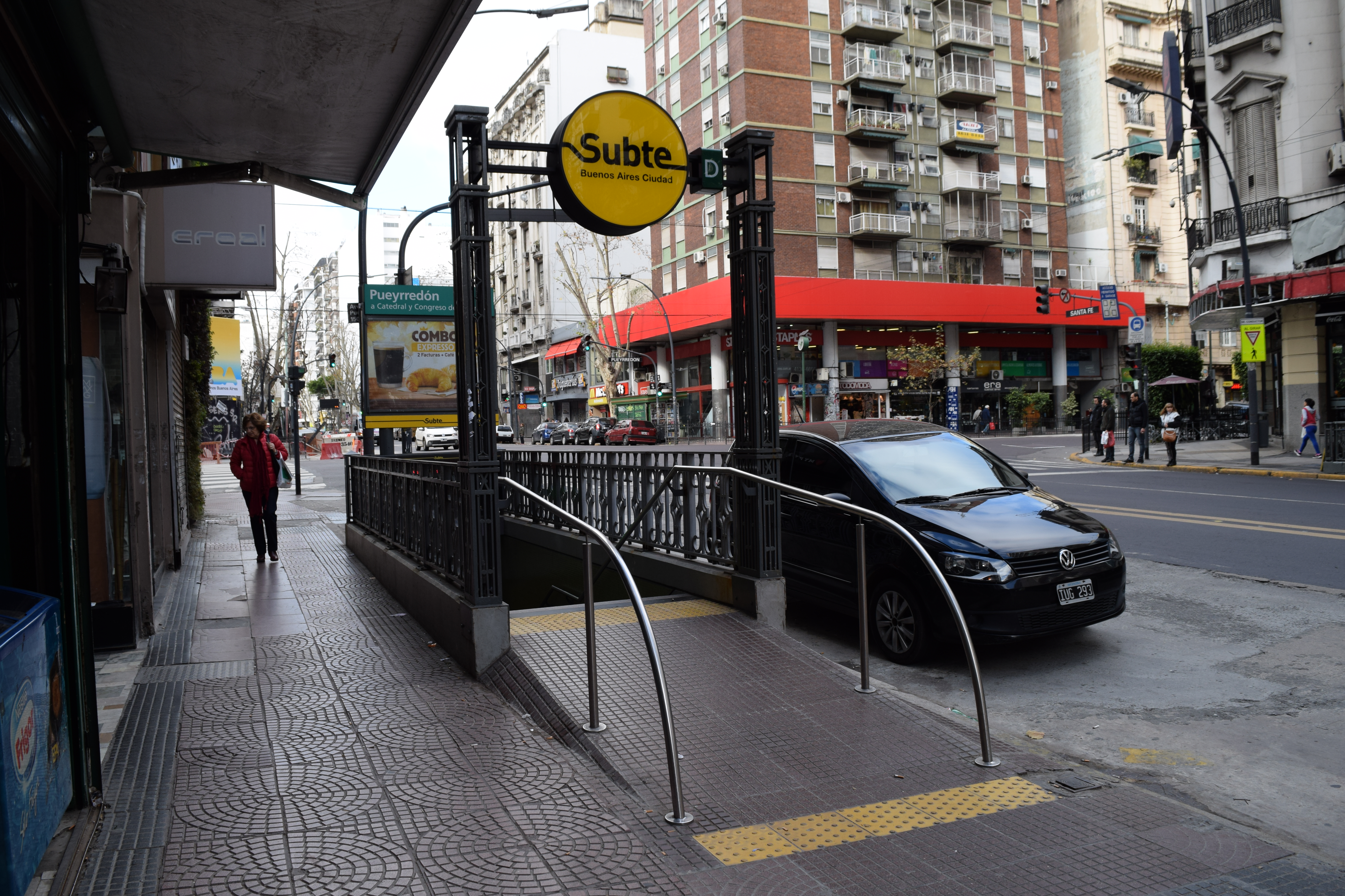 Estación Santa Fé de la Línea H del Subte de Buenos Aires.